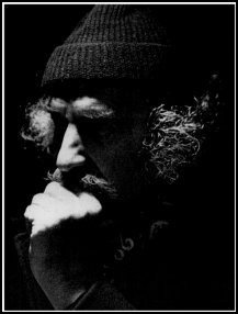 L'écrivain Claude Seignolle, « sorcier des contes et légendes. »